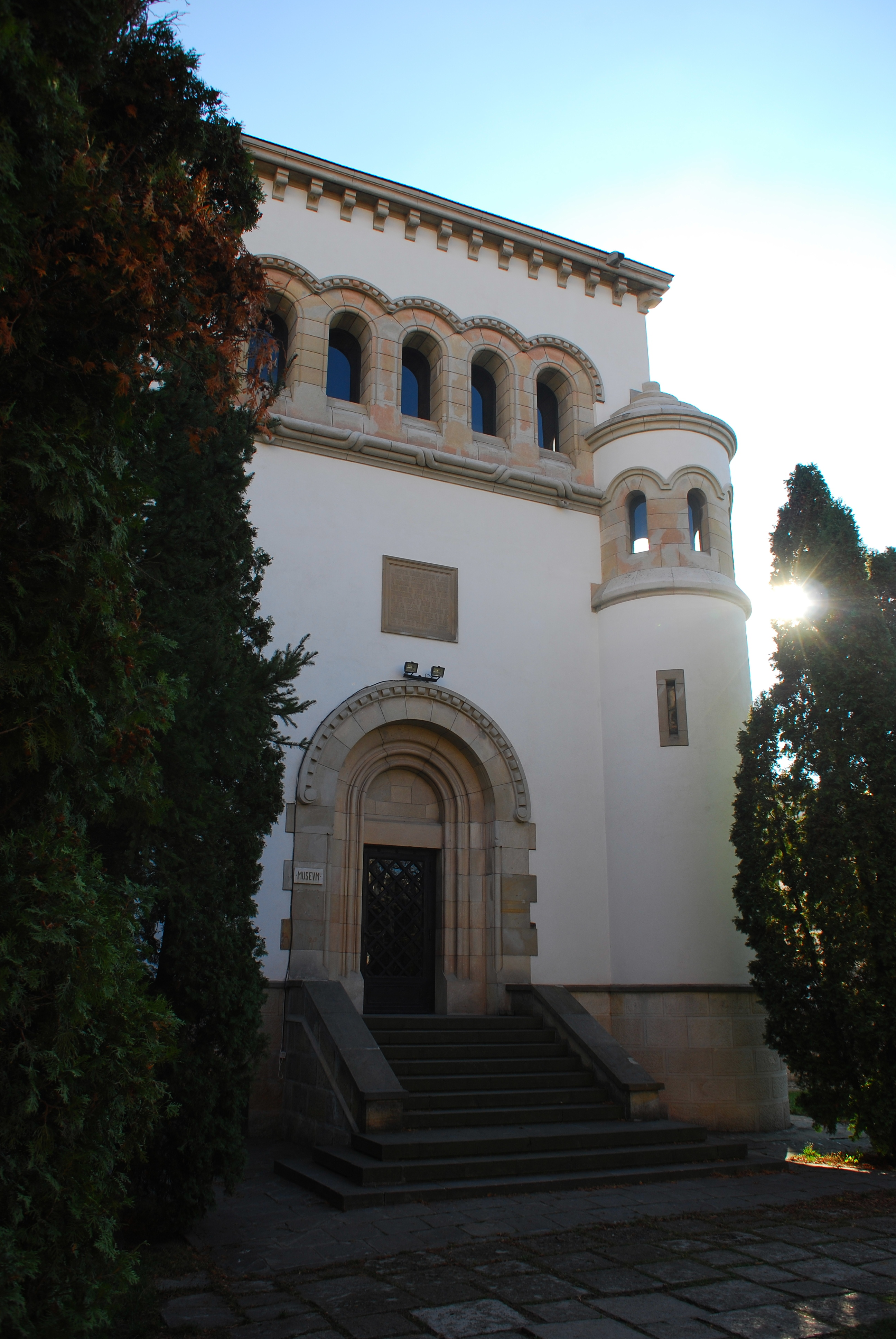 Sala gotică 02